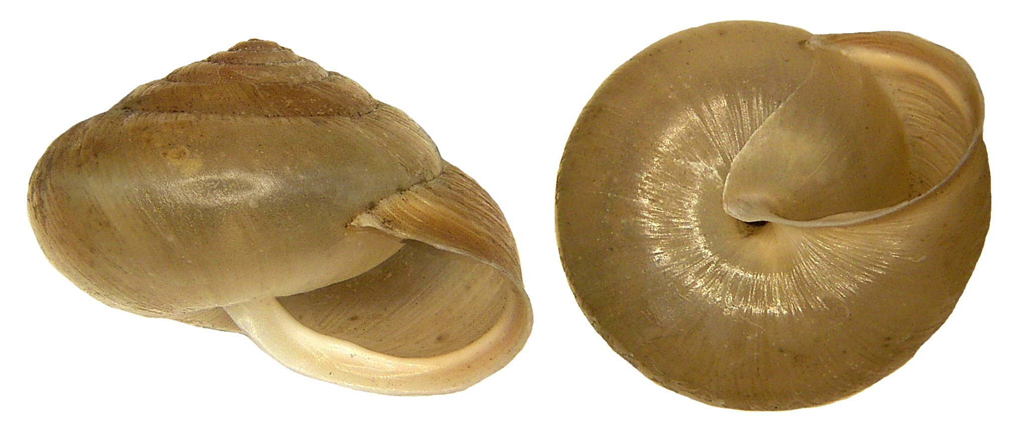 Familie: Helicidae Groesse: 9-11 x 13-16 mm Verbreitung: Mittel- und Südosteuropa Ökologie: feuchte Standorte (Wälder, Hecken) Fundort: Germania, Bayern, Oberfranken, Kasendorf leg. det. U.Schmidt, 1972 Photo: U.Schmidt, 2008